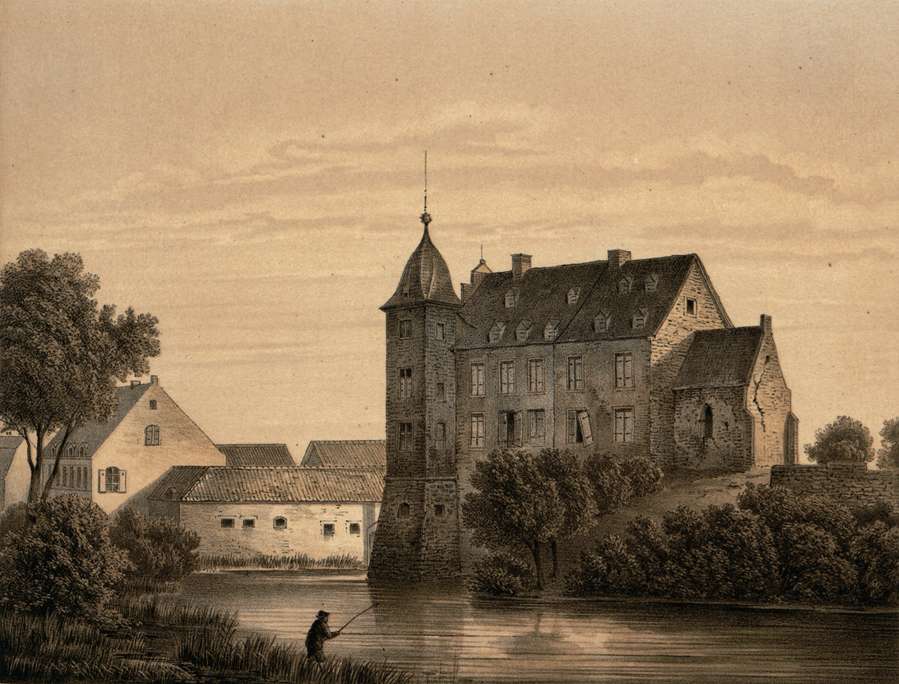 Burg Kühlseggen, Lithographie von Alexander Duncker